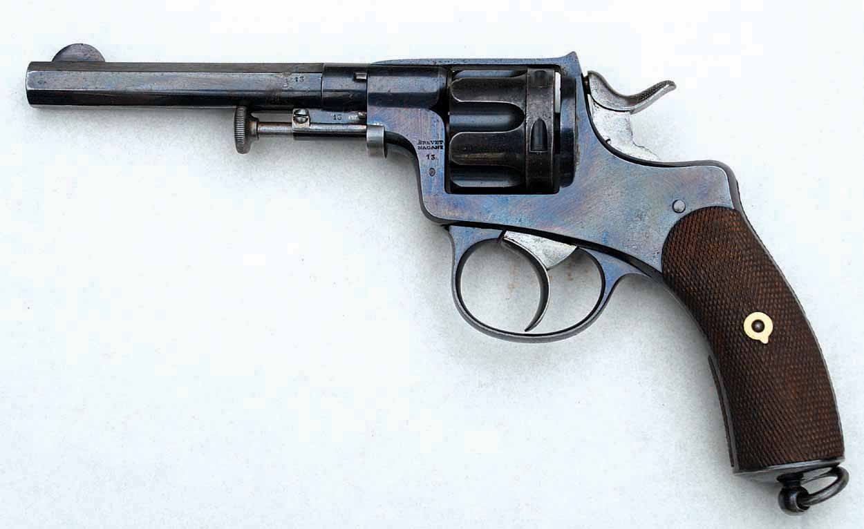 9 mm selvspent Nagant revolver som ble utprøvd i Norge i 1882